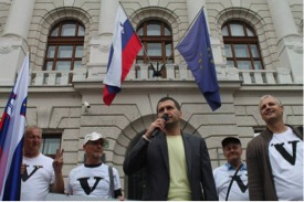 Damir Črnceč about2